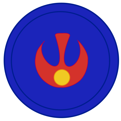 roman armenian legion simbol